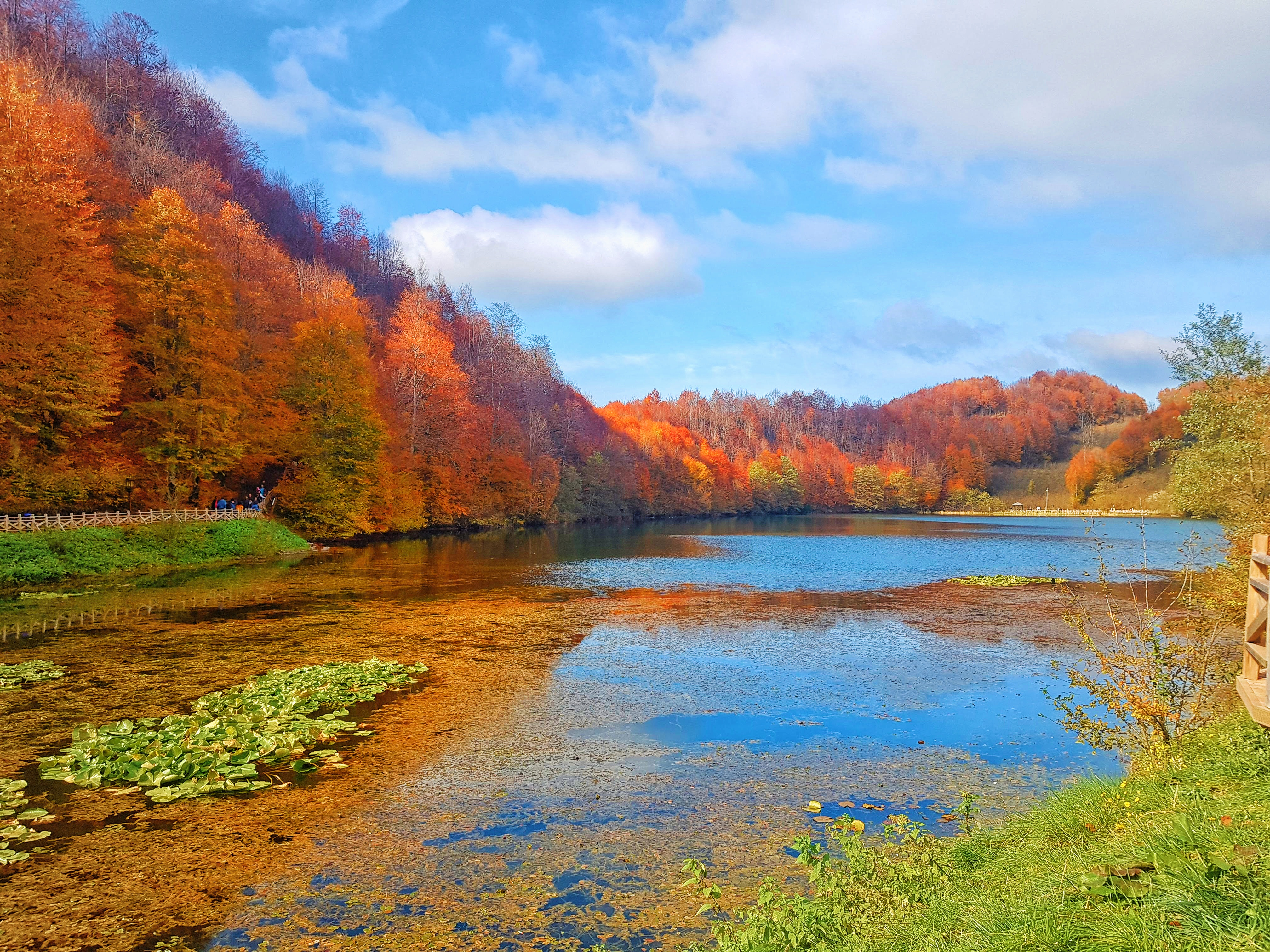 Eşsiz güzelliğiyle 4 mevsim insanları kendine hayran bırakan ulugöl